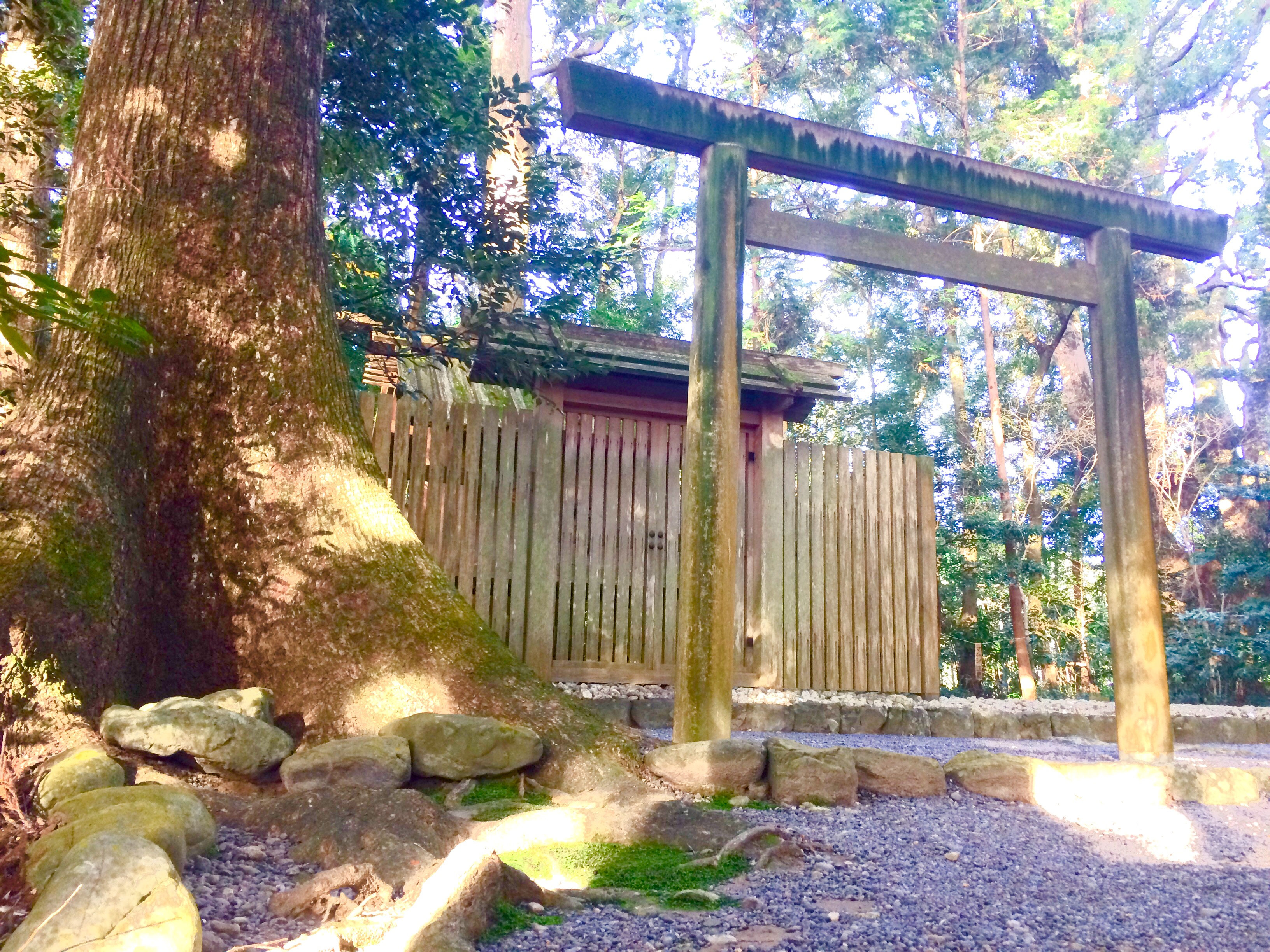 皇大神宮摂社久具都比賣神社(三重県度会町上久具)